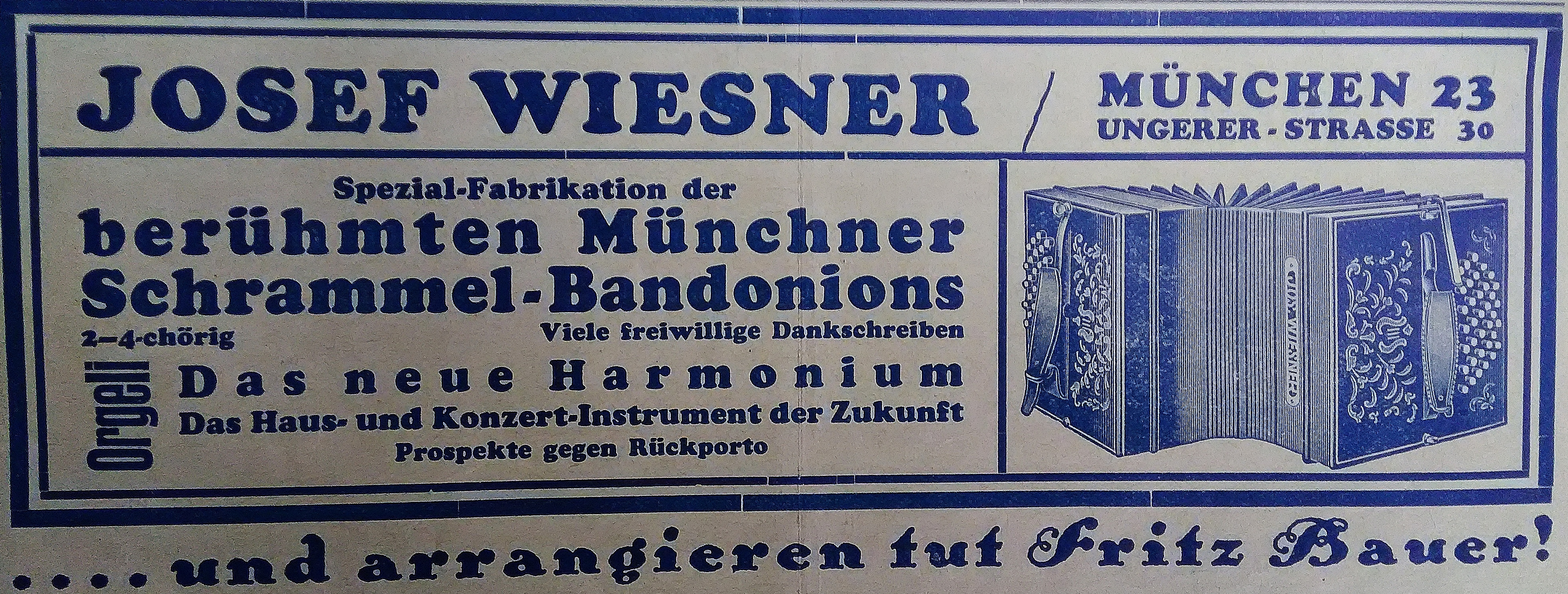 Vieja publicidad de la fabrica de bandoneones "Josef Wiesner" en Munich Alemania.